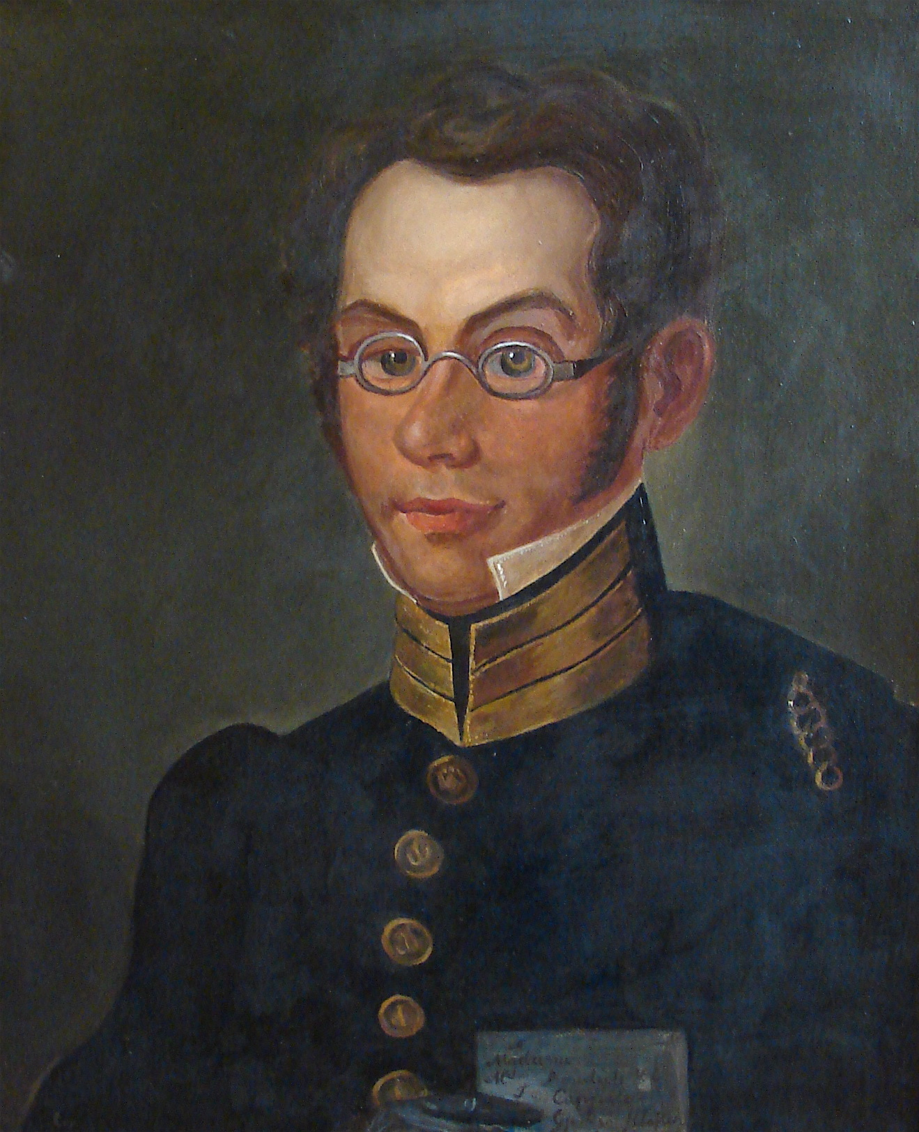 Sorenskriver Nicolai Benjamin Cappelen (1795–1866), Søndre Brekke Gård, Skien